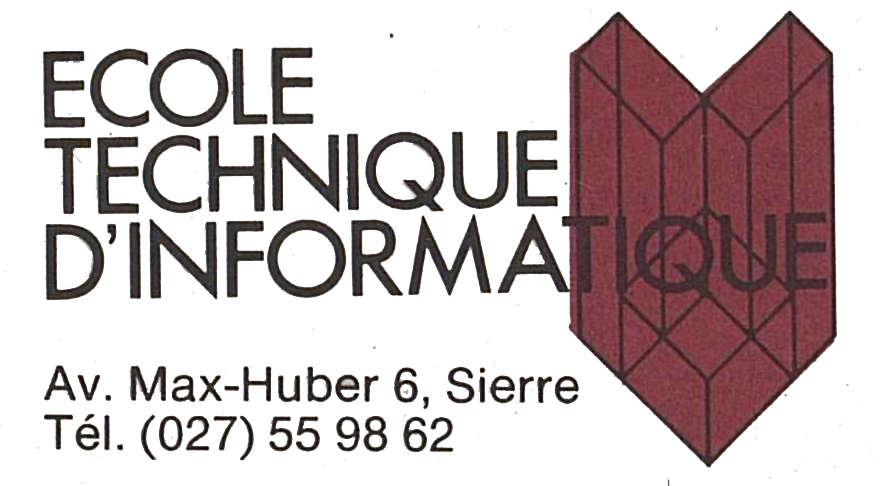 Logo de l'Ecole technique d'informatique de Sierre